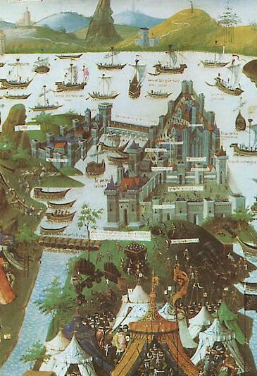 Ausschnitt aus einer Buchmalerei von 1455, Public Domain